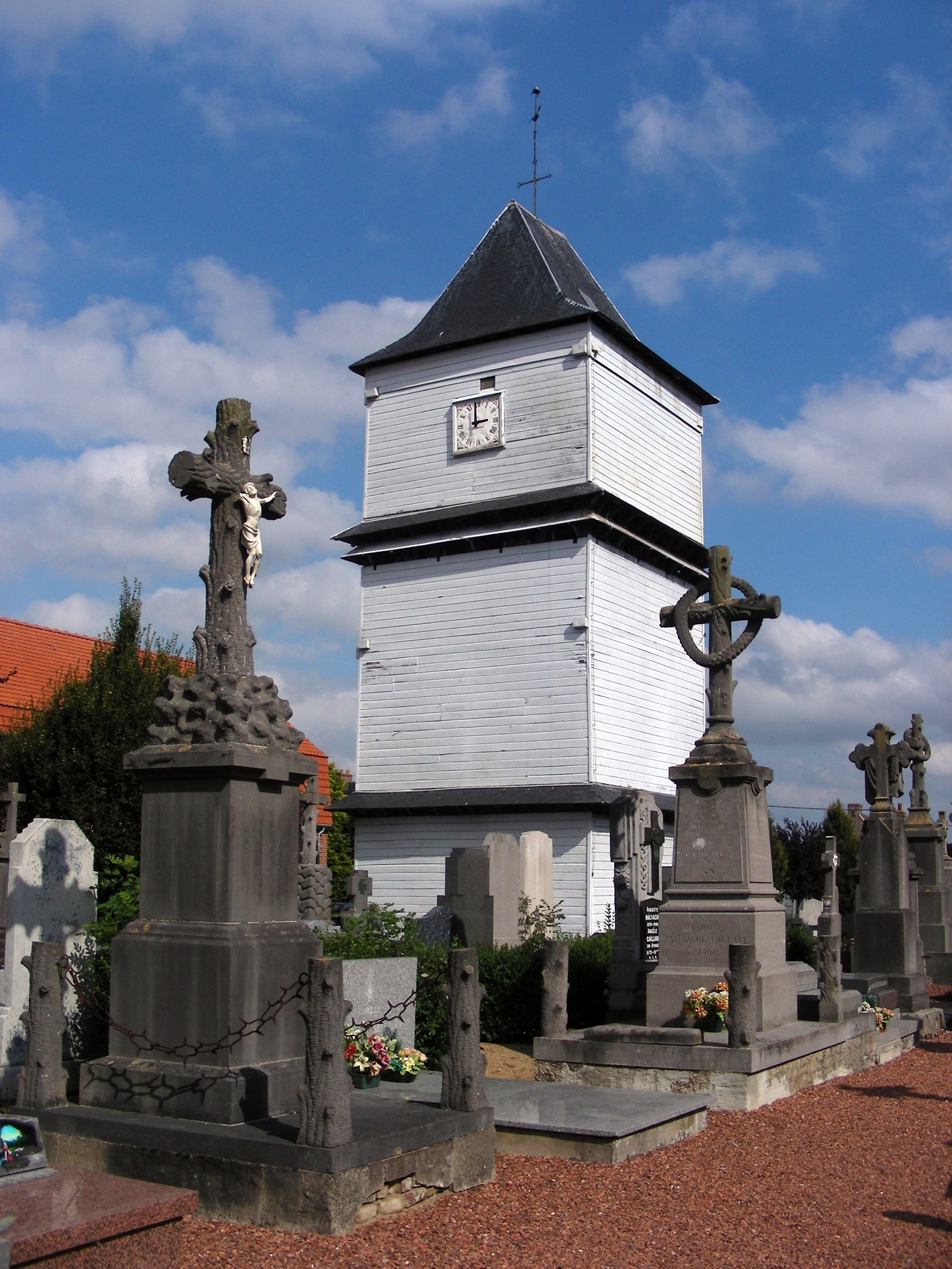 "Maison des cloches" : clocher en bois, séparé de l'église. .